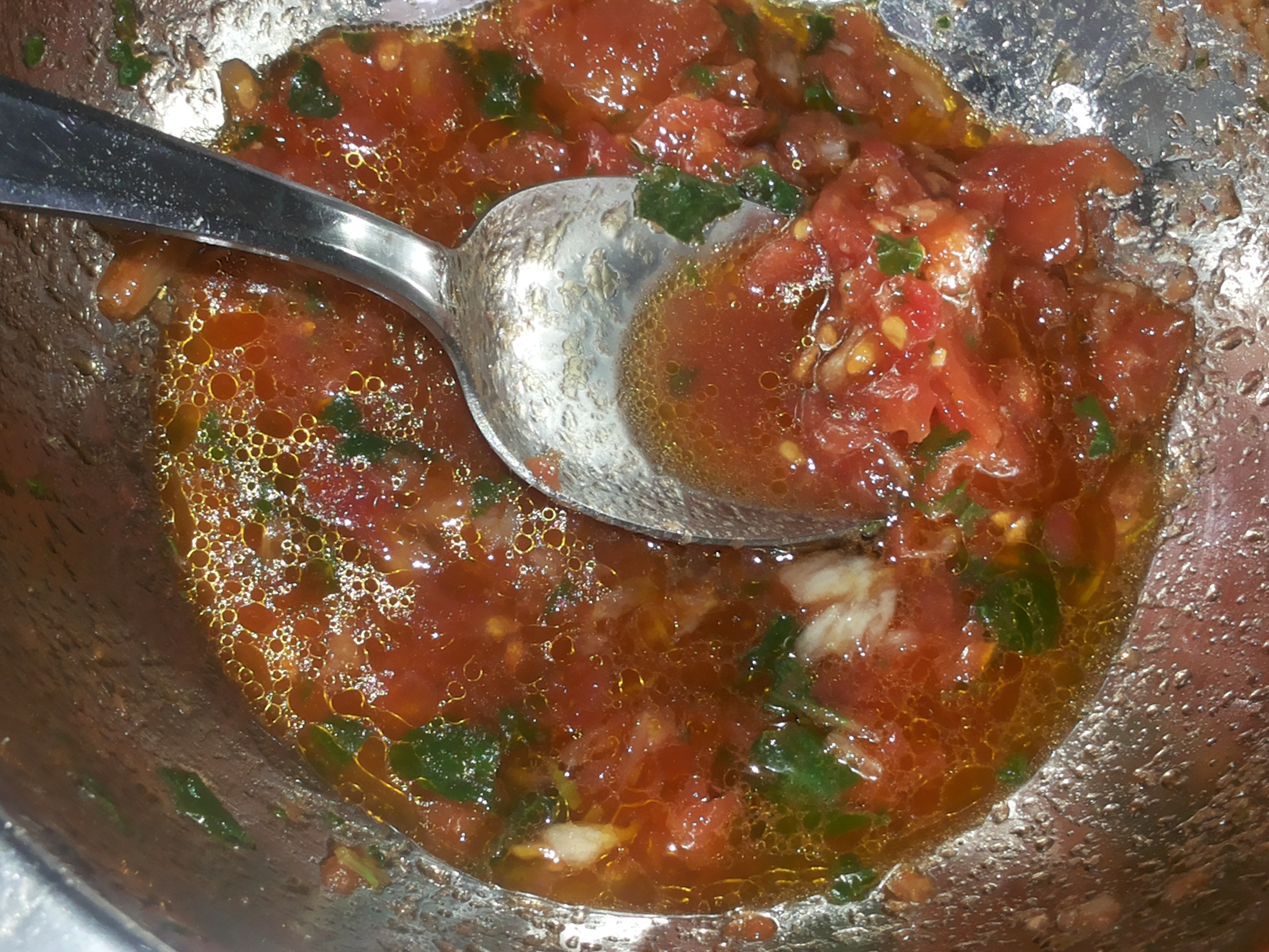 "Ammoglio" o Salamureci- salsa da pinzimonio tipica siciliana